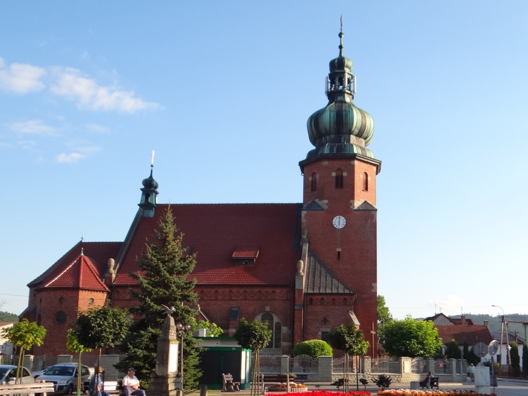 Kościół w Zembrzycach